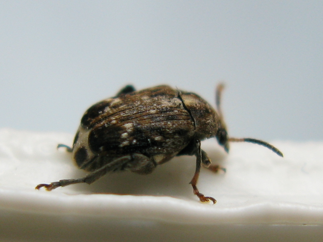 Bruchus pisorum - Hamburg